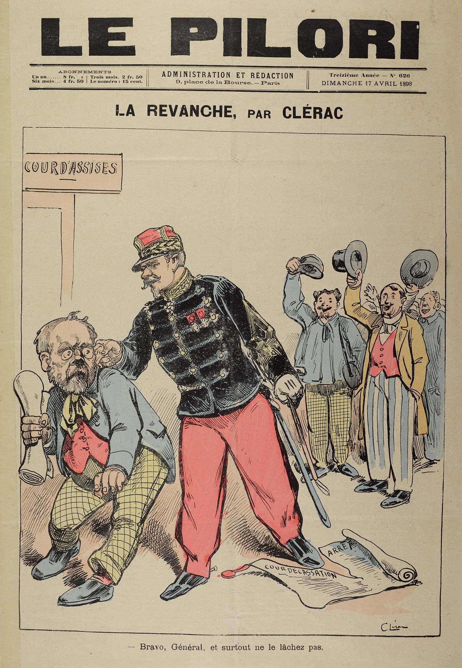 Zola dans le journal Le Pilori. Bravo Général, et surtout ne le lachez pas